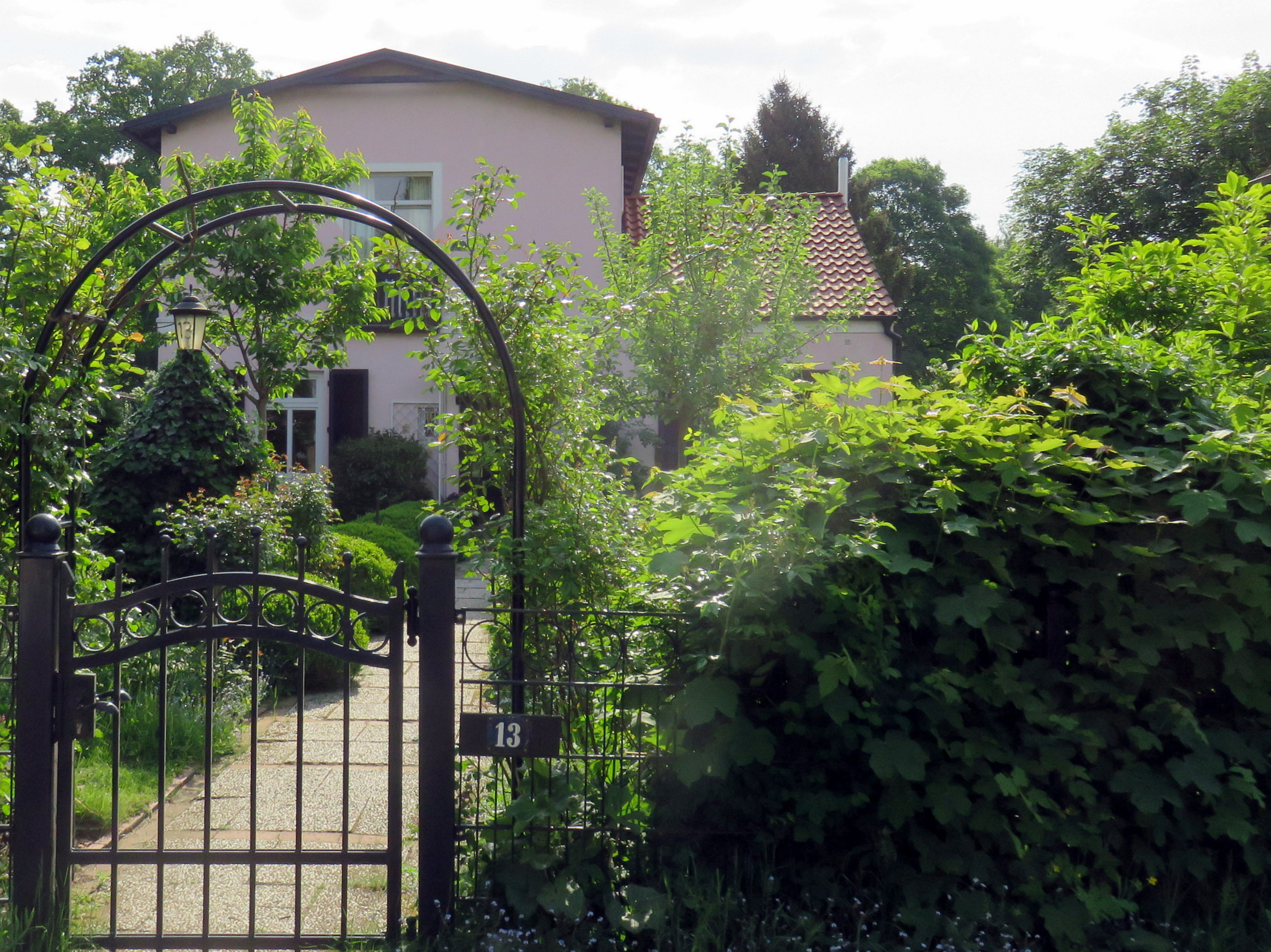 Das Wohnhaus des deutschen Impressionismus-Malers Ernst Eitner, Am Gnadenberg 13 in Hamburg-Hummelsbüttel, welches nach seinen eigenen Plänen 1903 oberhalb des Susebek-Tals errichtet worden war.